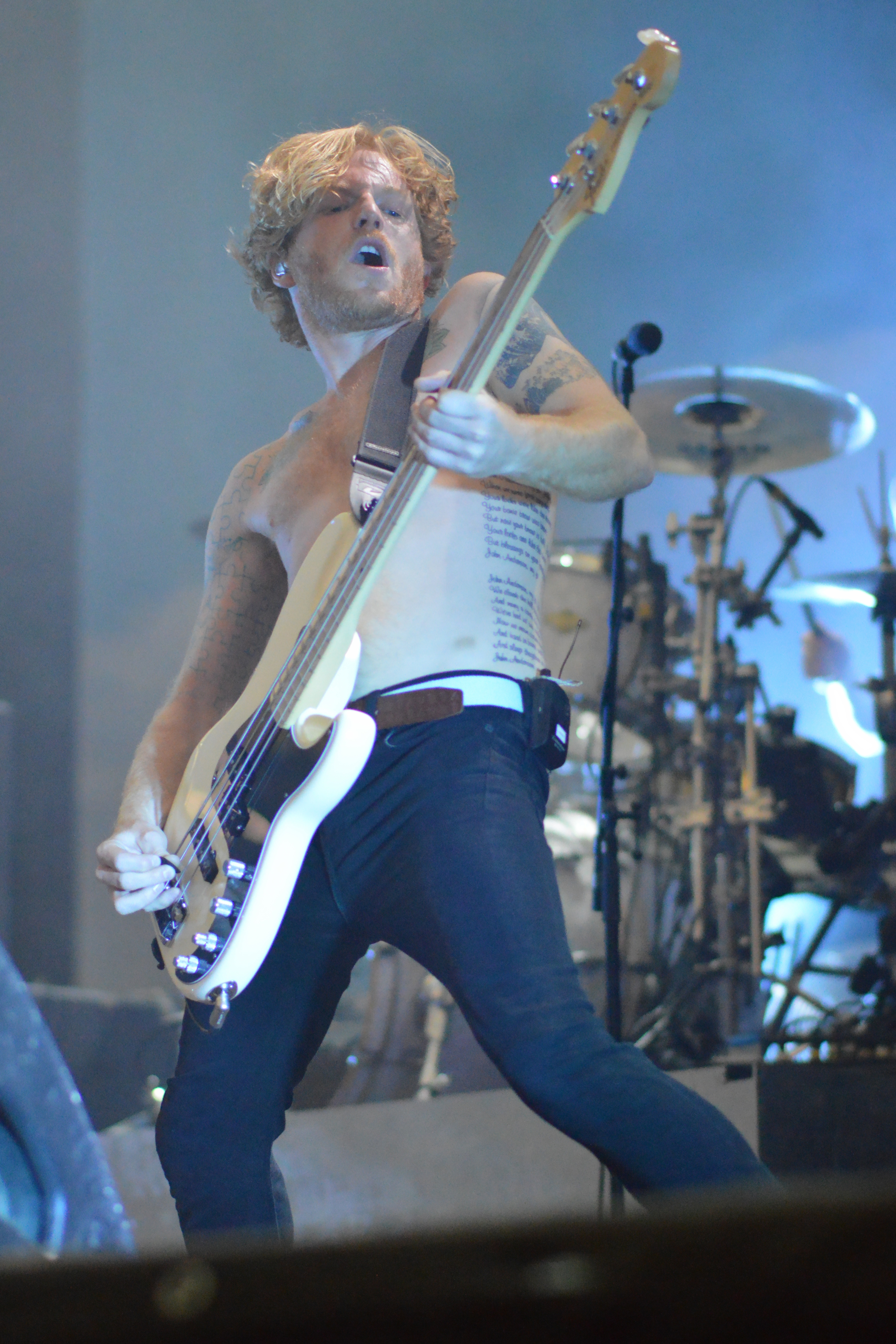 James Johnston von Biffy Clyro bei Rock im Pott 2013